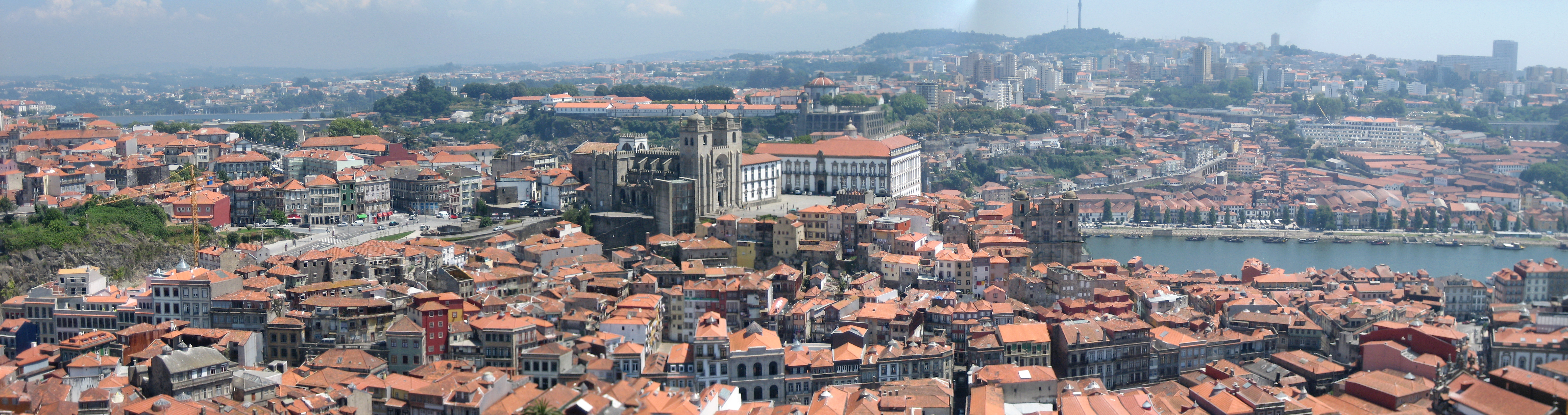 From the Torre dos Clérigos. A beautiful city. Porto, Portugal